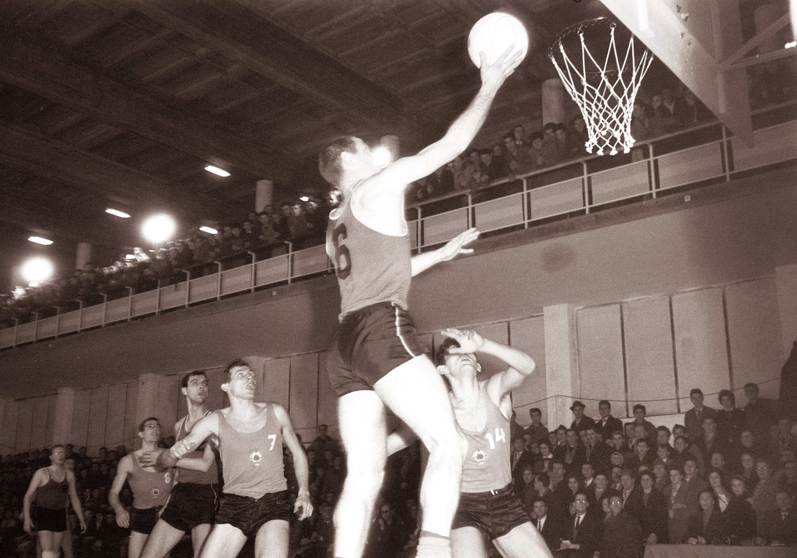 Košarka Jugoslavija-Belgija.